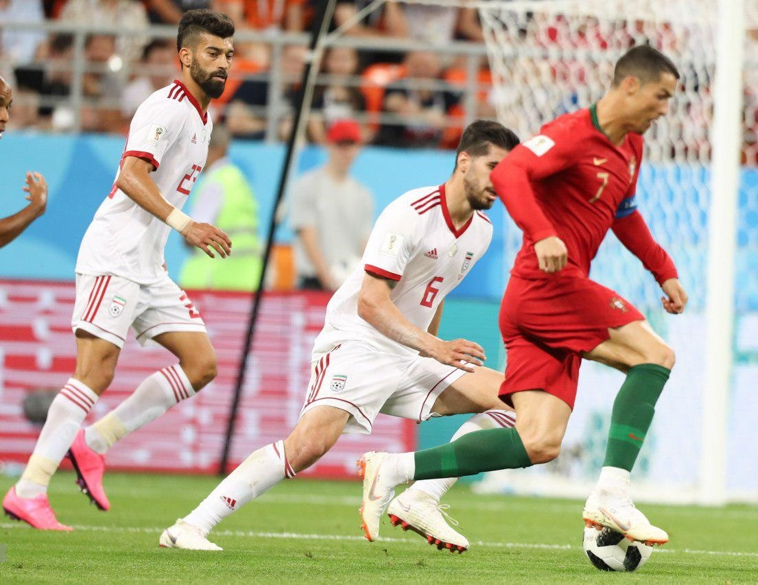 نیمه دوم بازی تیم‌های فوتبال ایران و پرتغال در جام جهانی ۲۰۱۸